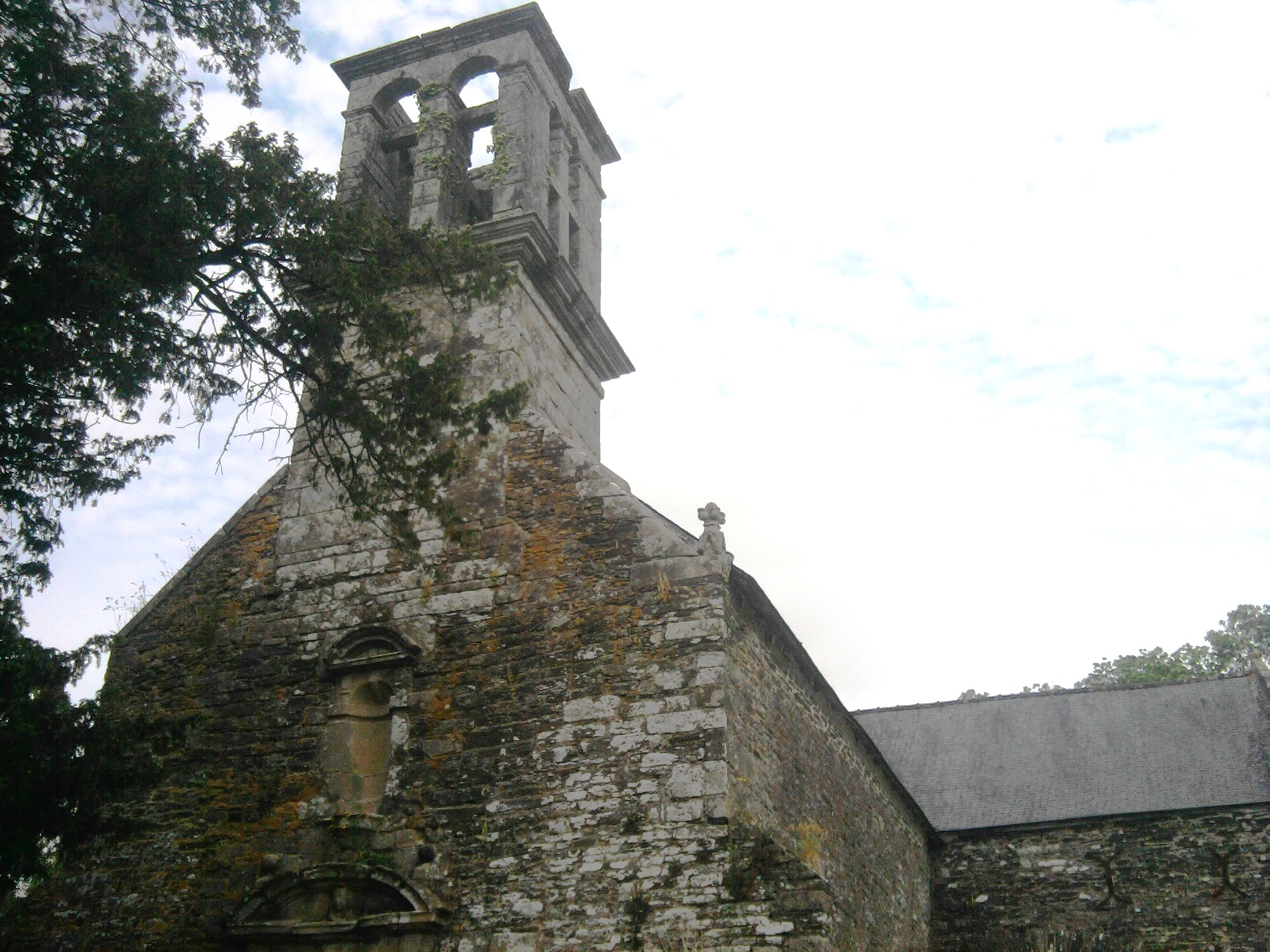 L'église du Vieux-Bourg à Lothey (Frnace)